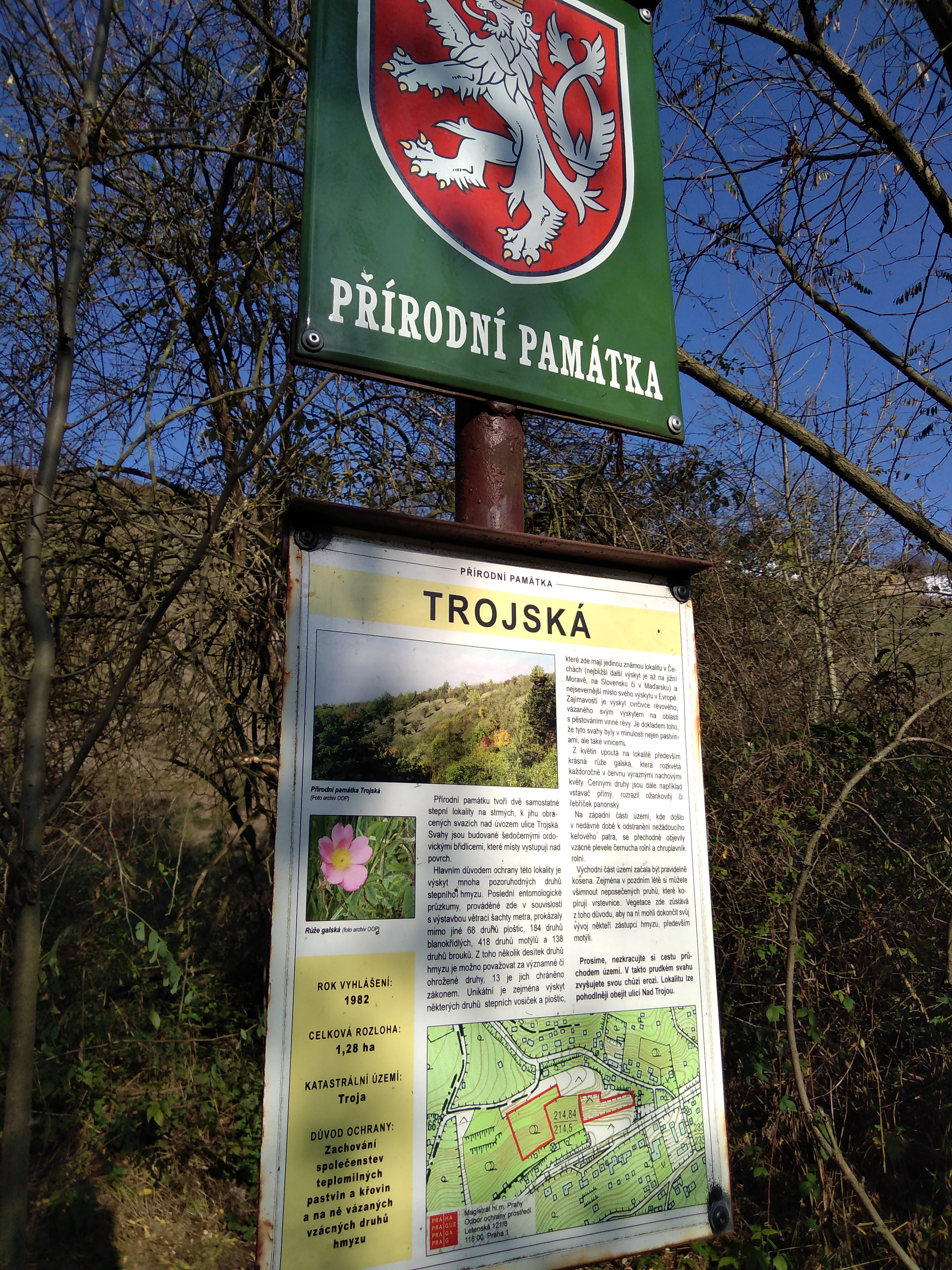 Informační tabule spolu s cedulí označující přírodní památku Trojská v Praze 8